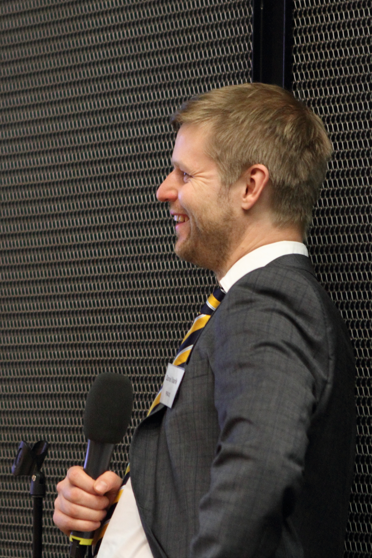 Daniel Vaarik konverentsil Eesti IT Visioon 2020: Kick Off moderaatorina Kumu auditooriumis.